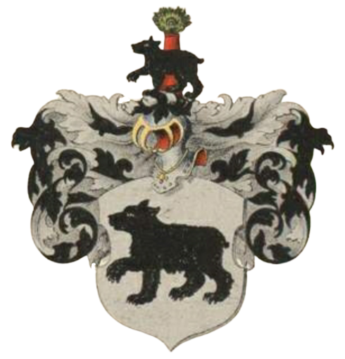 Behri suguvõsa parunivapp